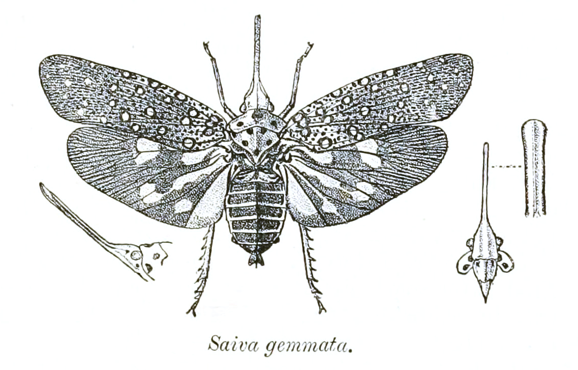 Saiva gemmata